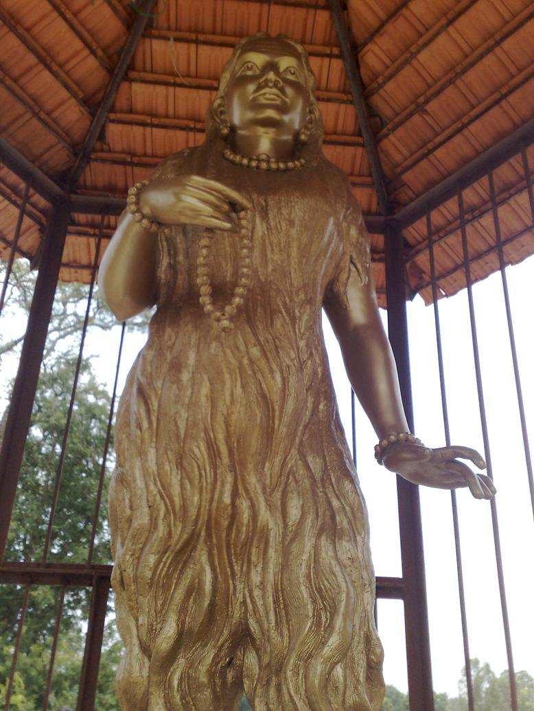 Statue made at Studio Pratima (Mysore) of the Kannada poetess, Akkamahadevi installed at her birth-place Udathadi (Udatadi/Udugani), Shimoga district, Karnataka, India